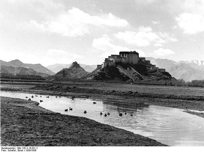 Lhasa, Potala und Medizinberg von Osten